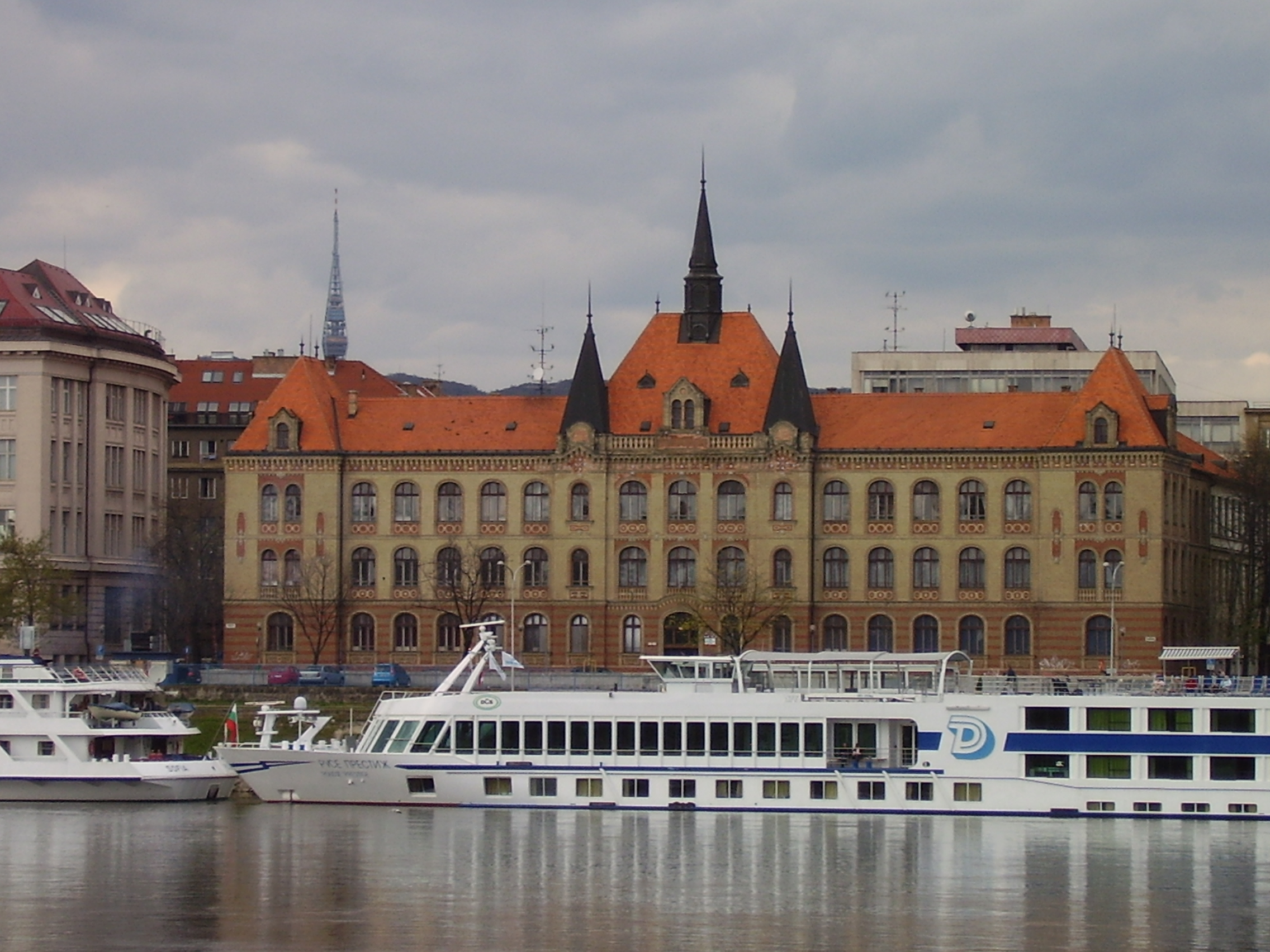 Bratislava riverfront